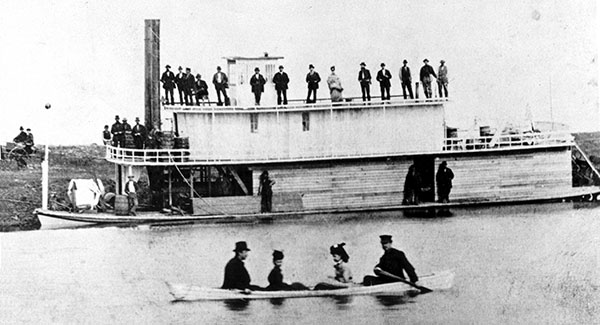 Sternwheeler Alpha